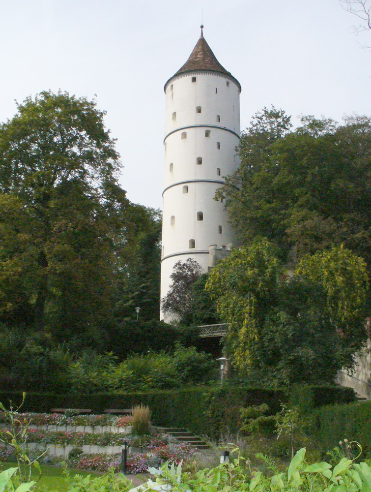 Biberach, Weißer Turm